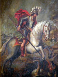 Sint Joris en de draak, foto van een schilderij in de Sint Gertrudiskerk te Beesel